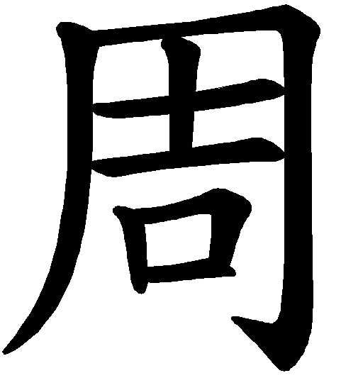 Surname Zhou 周